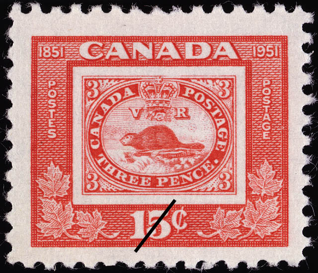 Timbre Poste Canada 15 cents Timbre Castor 1951